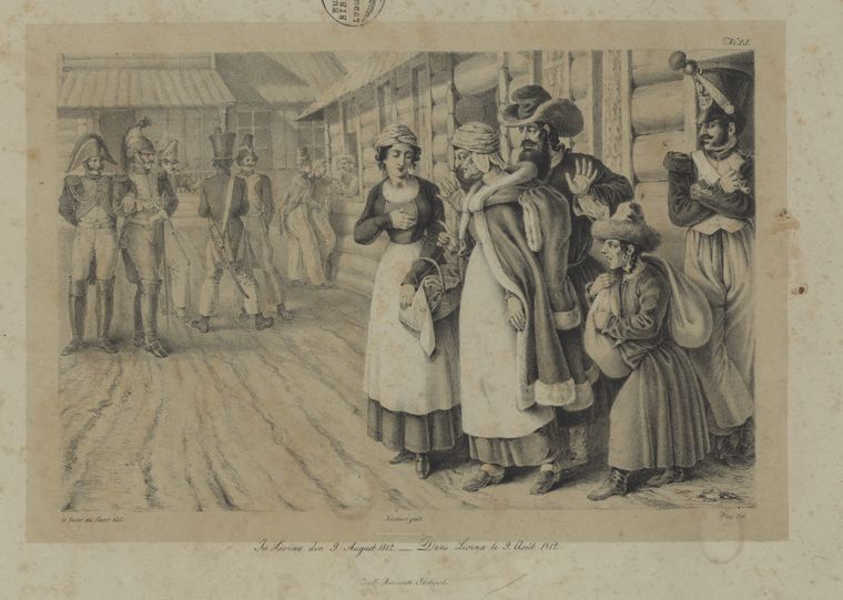 Беларуская (тарашкевіца): Лёзна (Lozna), 9 жніўня 1812